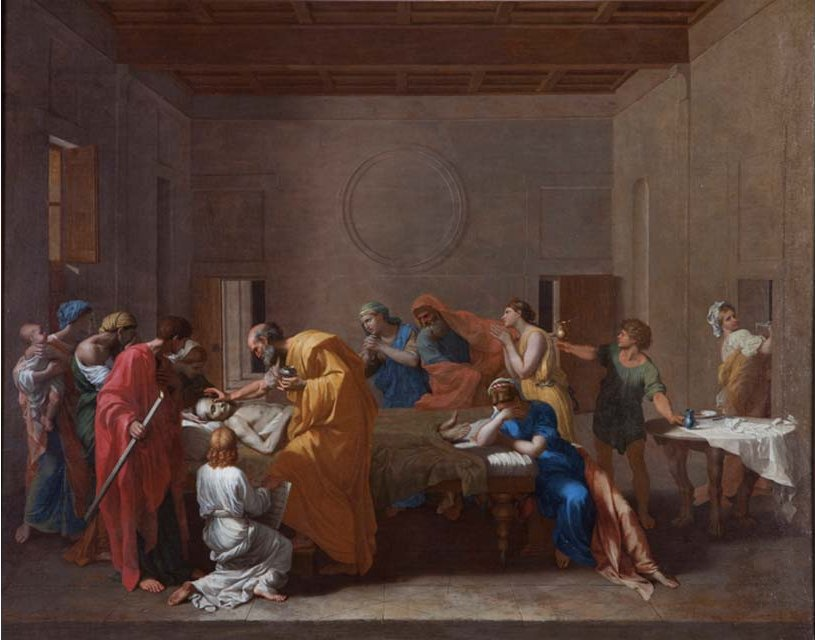 première version